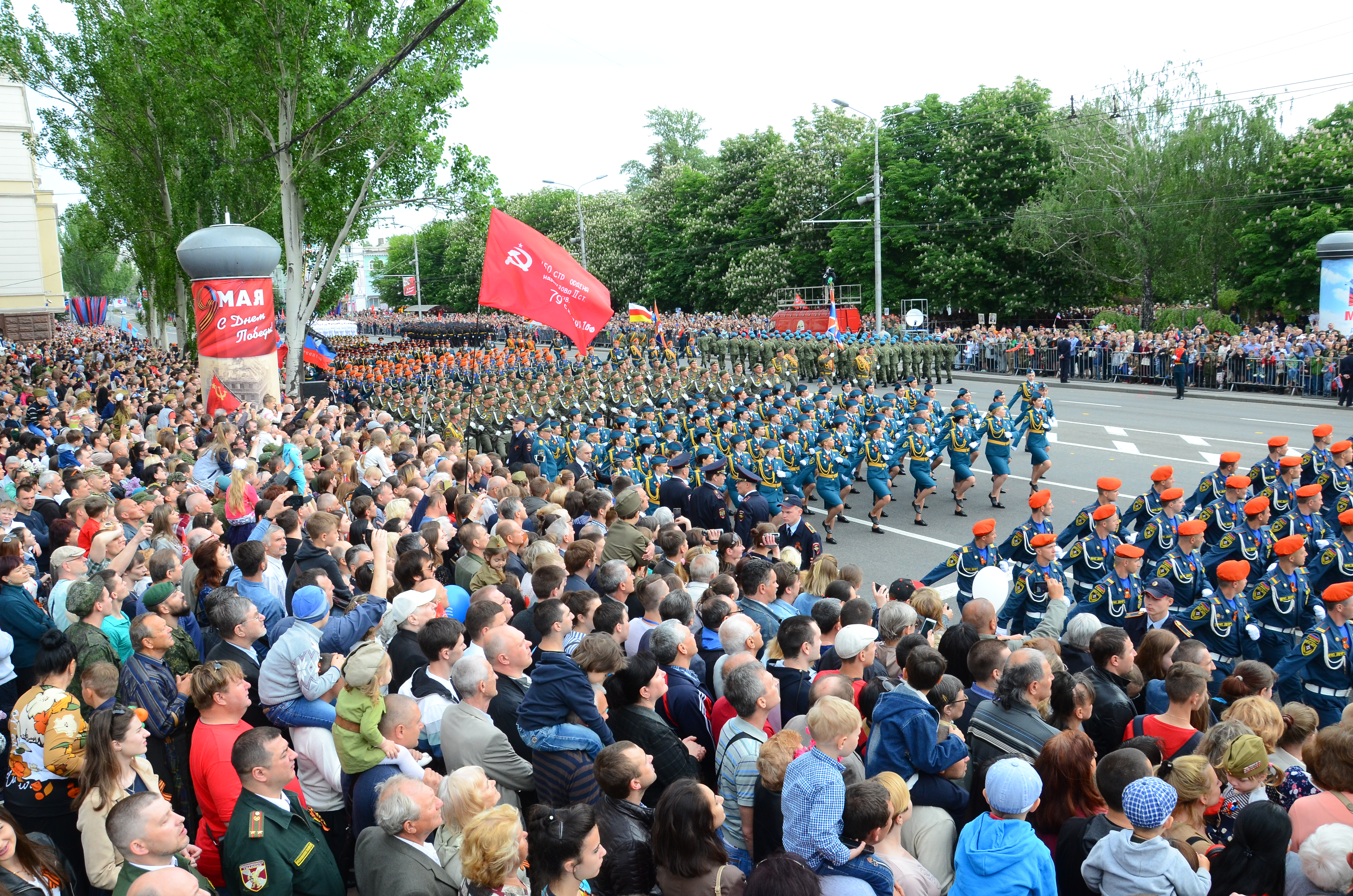 День Победы в Донецке